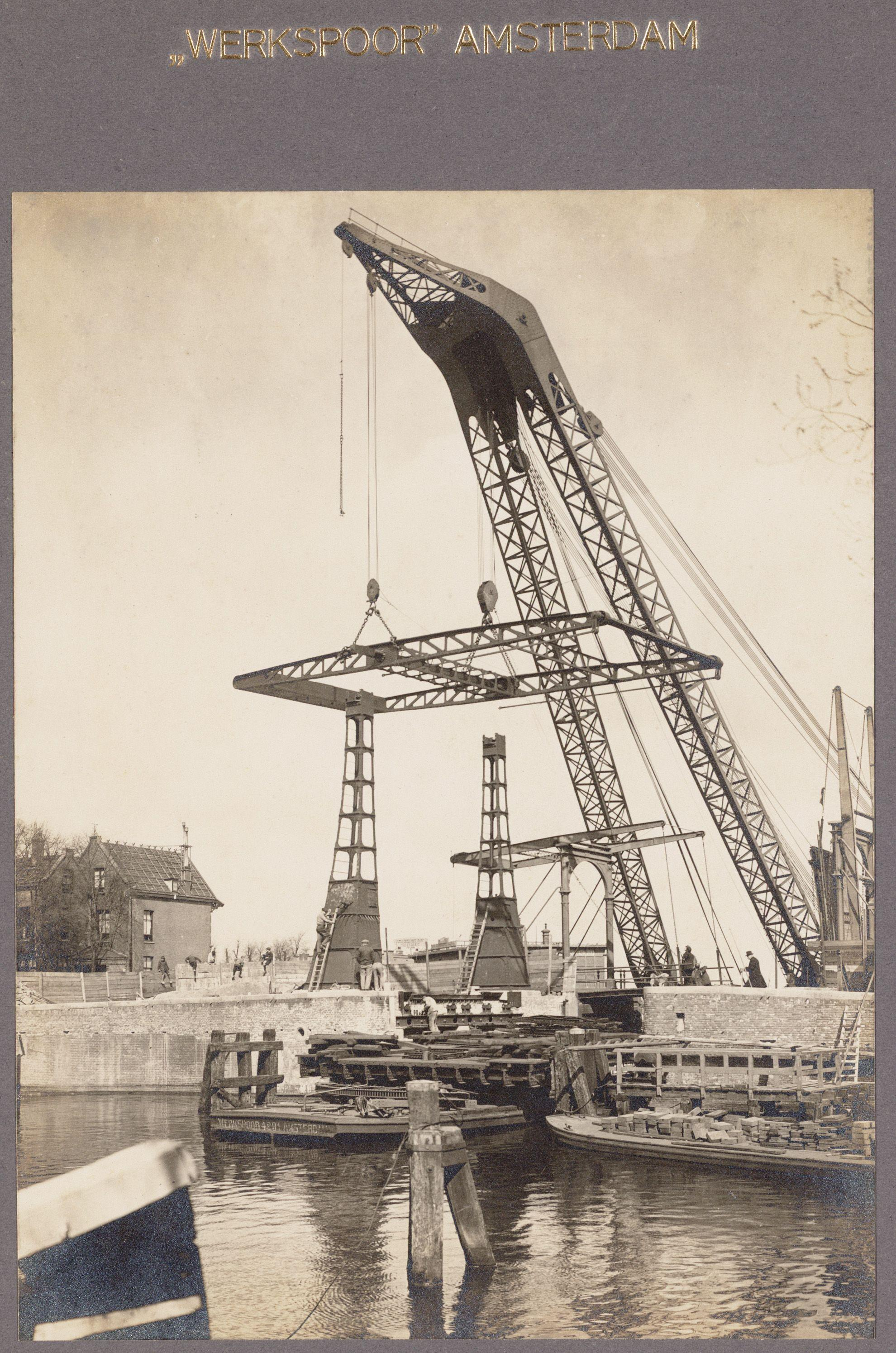 Beschrijving Nieuwe ophaalbrug (brug 346) over het Westerkanaal ter hoogte van de Westerkeersluis Het plaatsen van de balans door de Firma Werkspoor Amsterdam. Gezien Houtmankade hoek Tasmanstraat. Op de achtergrond de oude, dubbele ophaalbrug. Documenttype foto Collectie Collectie Richardus Datering 1919 Geografische naam Houtmankade Tasmanstraat Inventarissen Afbeeldingsbestand 010003025158